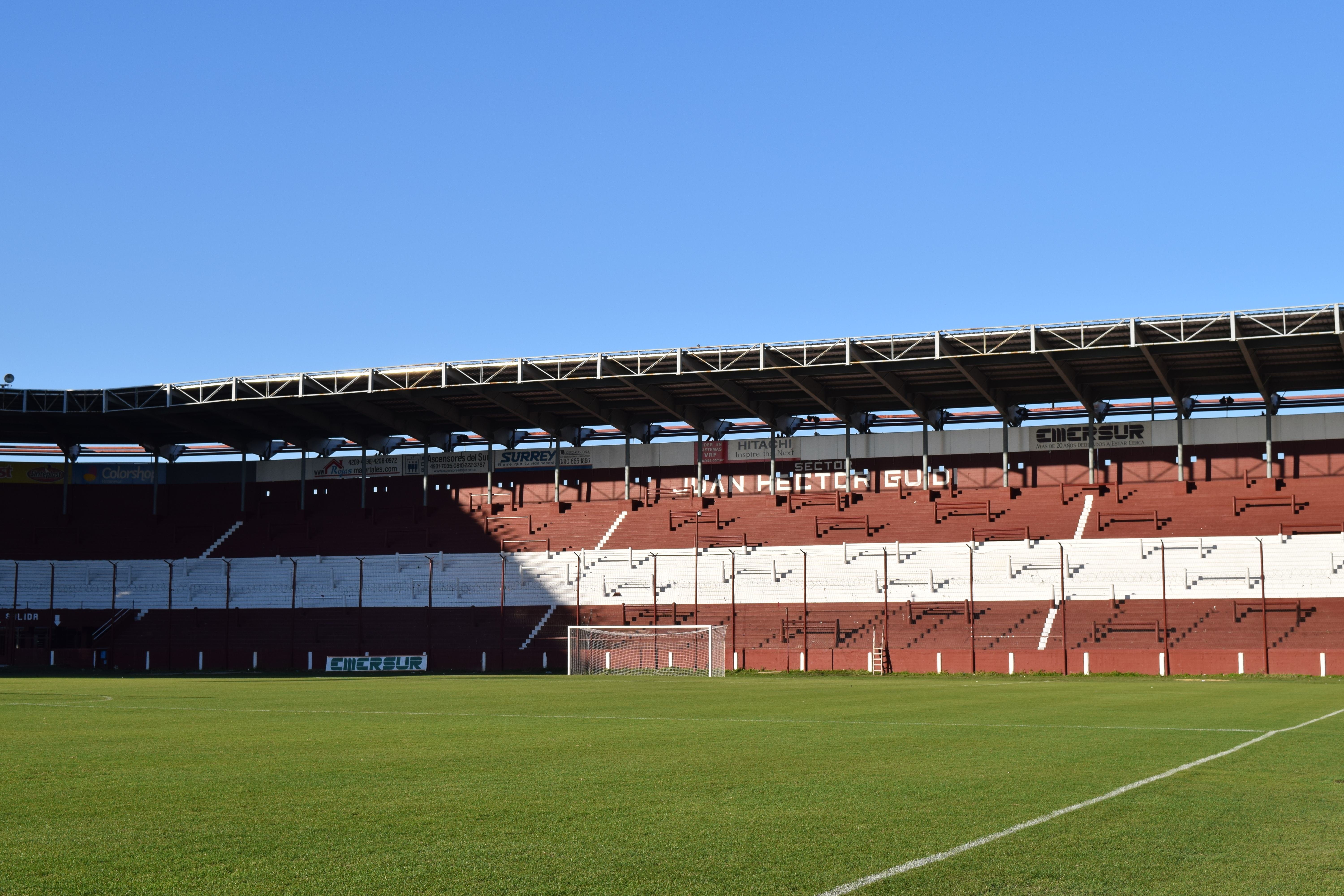 Vista de la tribuna norte (sector Juan Héctor Guidi) del Estadio Ciudad de Lanús - Néstor Díaz Pérez.